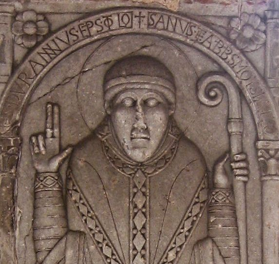 Durand de Bredon, représenté sur un pilier de l'Abbaye de Moissac